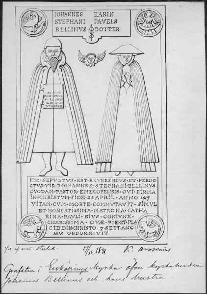 Gravhäll över Johannes S. Bellinus med familj. Avritning 1/10 1891 av Karl Arosenius. Kategori: (09) Gravar Gravhäll över Johannes S. Bellinus med familj. Avritning 1/10 1891 av Karl Arosenius.